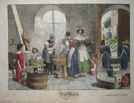 aus: Bilder aus dem Leben zu angenehmer, nützlicher Unterhaltung und mündlicher Belehrung für Knaben und Mädchen.